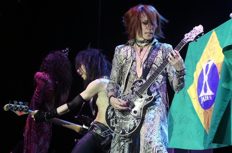 HSBC Brasil - São Paulo/SP - 11/09/2011